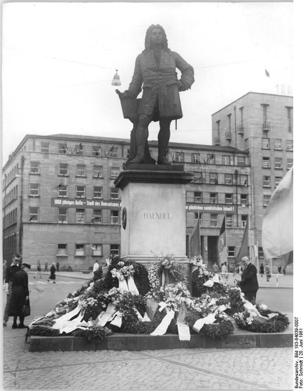 Halle, Händel-Denkmal Zentralbild Schmidt 20.6.1961 Halle an der Saale UBz: Das Haendel-Denkmal.